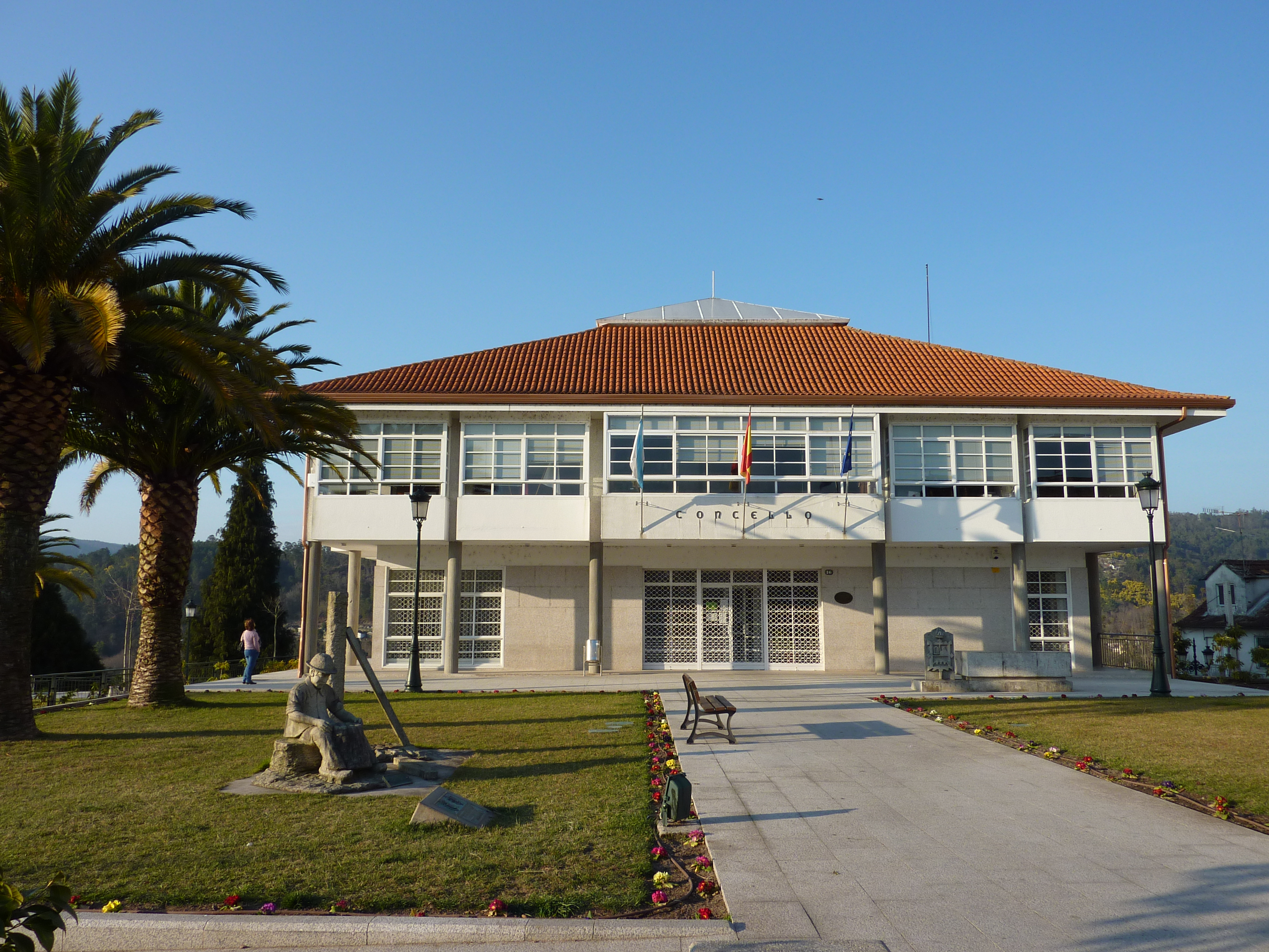 Foto del ayuntamiento de MondarizGalego: Foto do concello de Mondariz